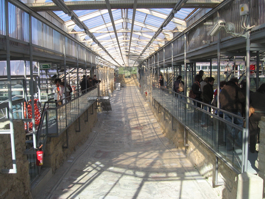 Villa Romana del Casale, Piazza Armerina, Sicily/Sicilia, Italy/Italien